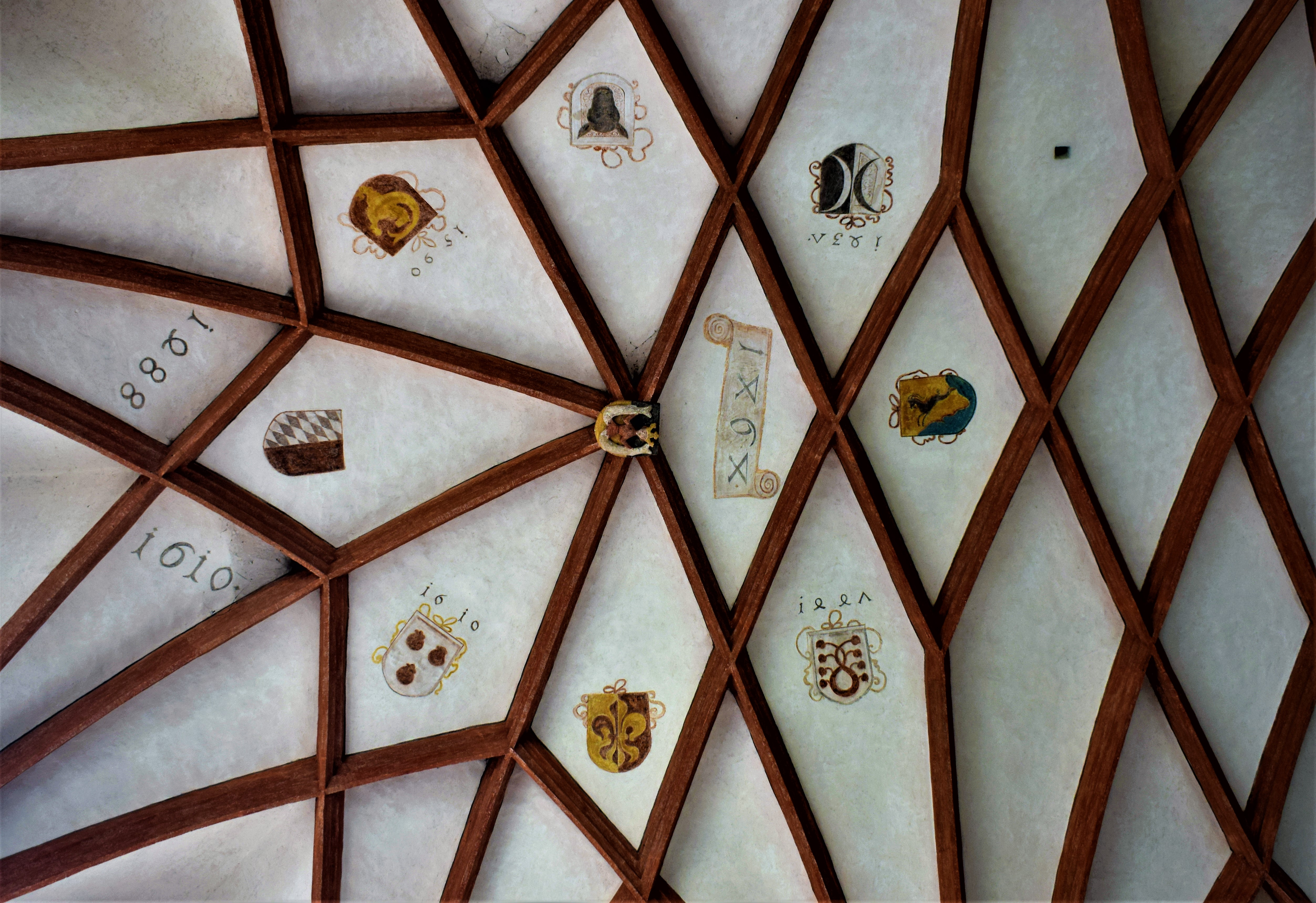 Rieterkirche Kalbensteinberg: Wappen und Jahreszahlen (um 1610) am Chorgewölbe